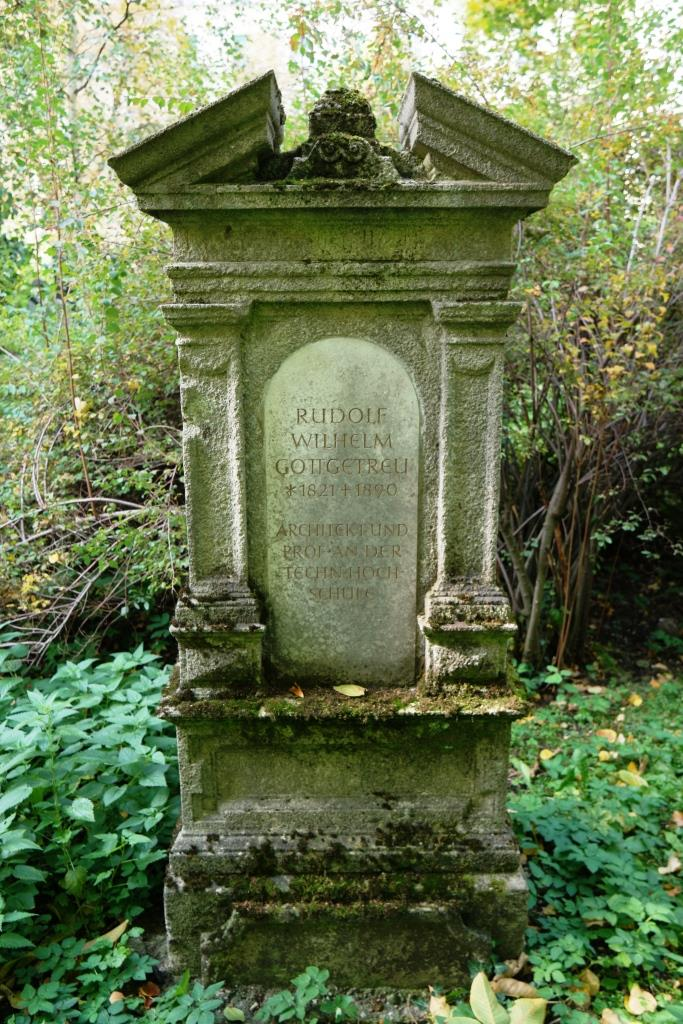 Grab des Architekten Rudolf Gottgetreu (1821-1890) auf dem Alten Südlichen Friedhof in München